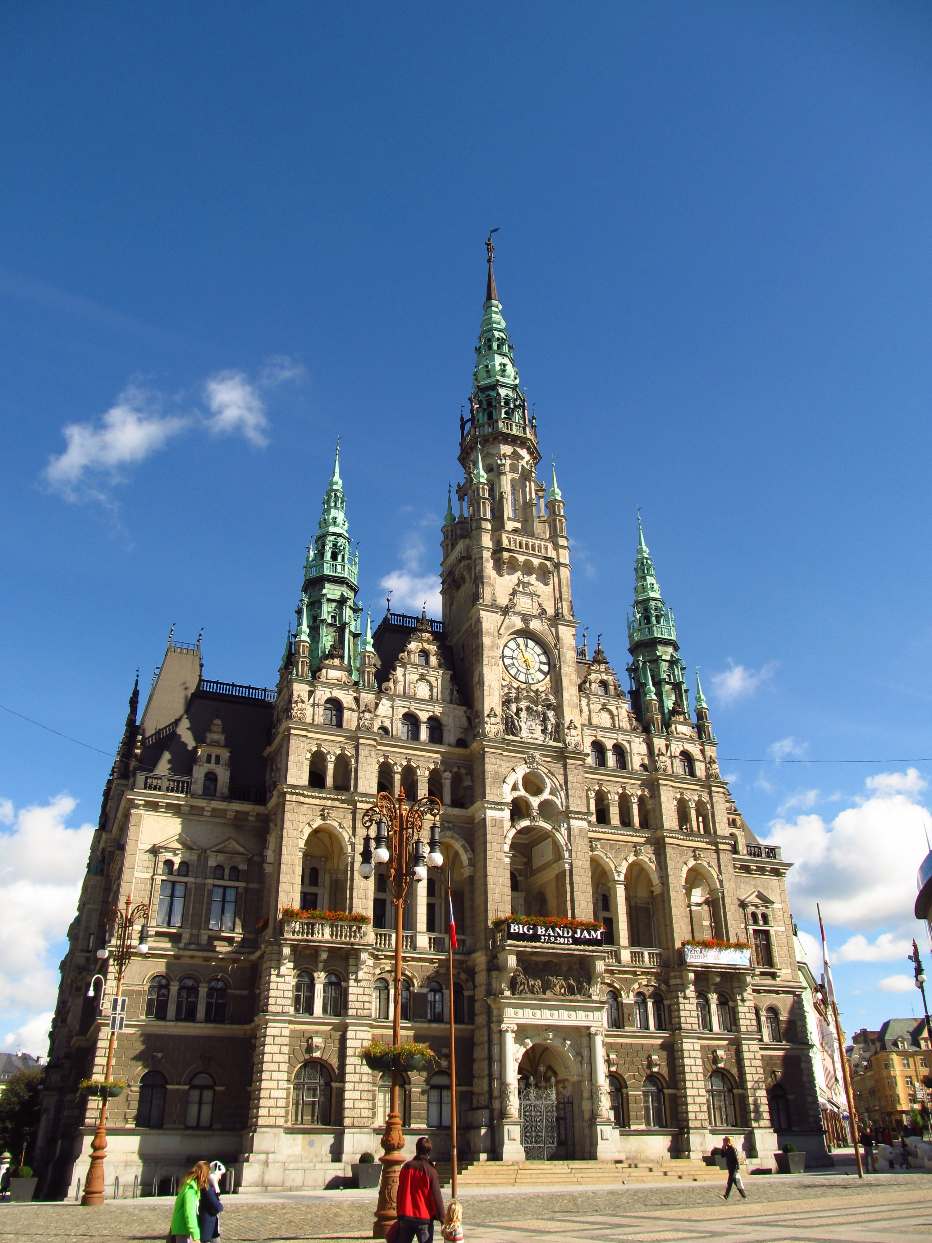 Radnice (Liberec), nám. Dr. Edvarda Beneše 1, Liberec